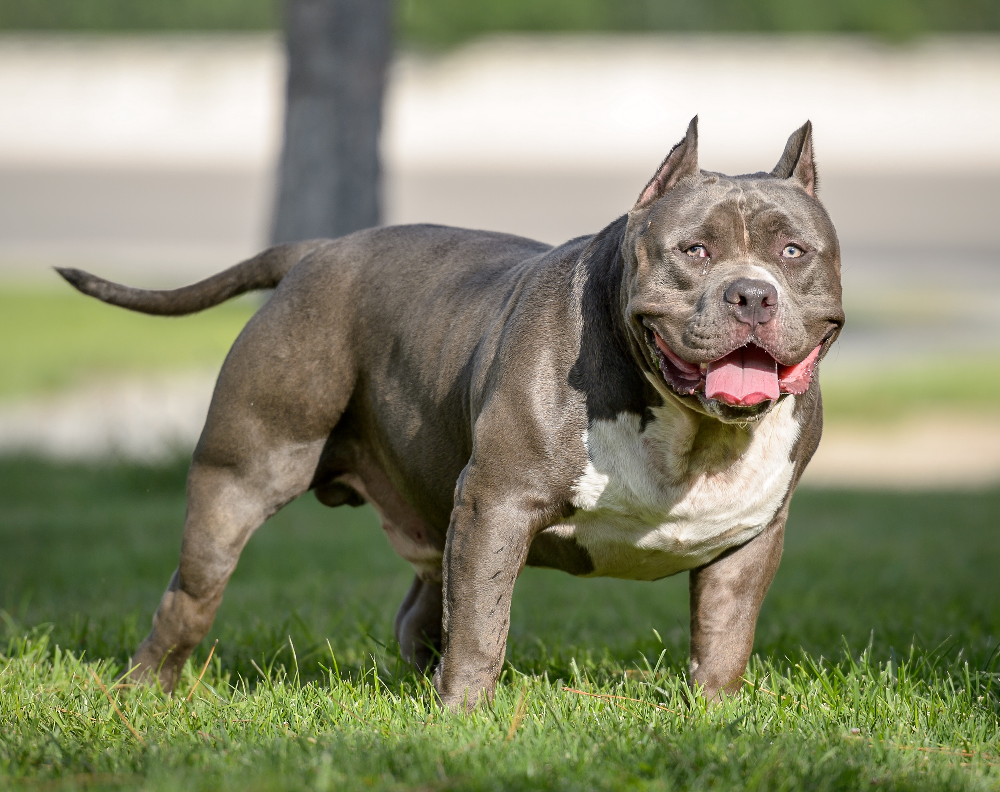 (2 ch GRAN DALI) BOTTIcelli